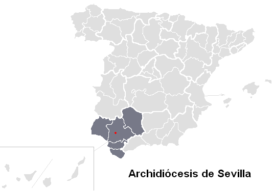 Situación de la archidiócesis de Sevilla en España